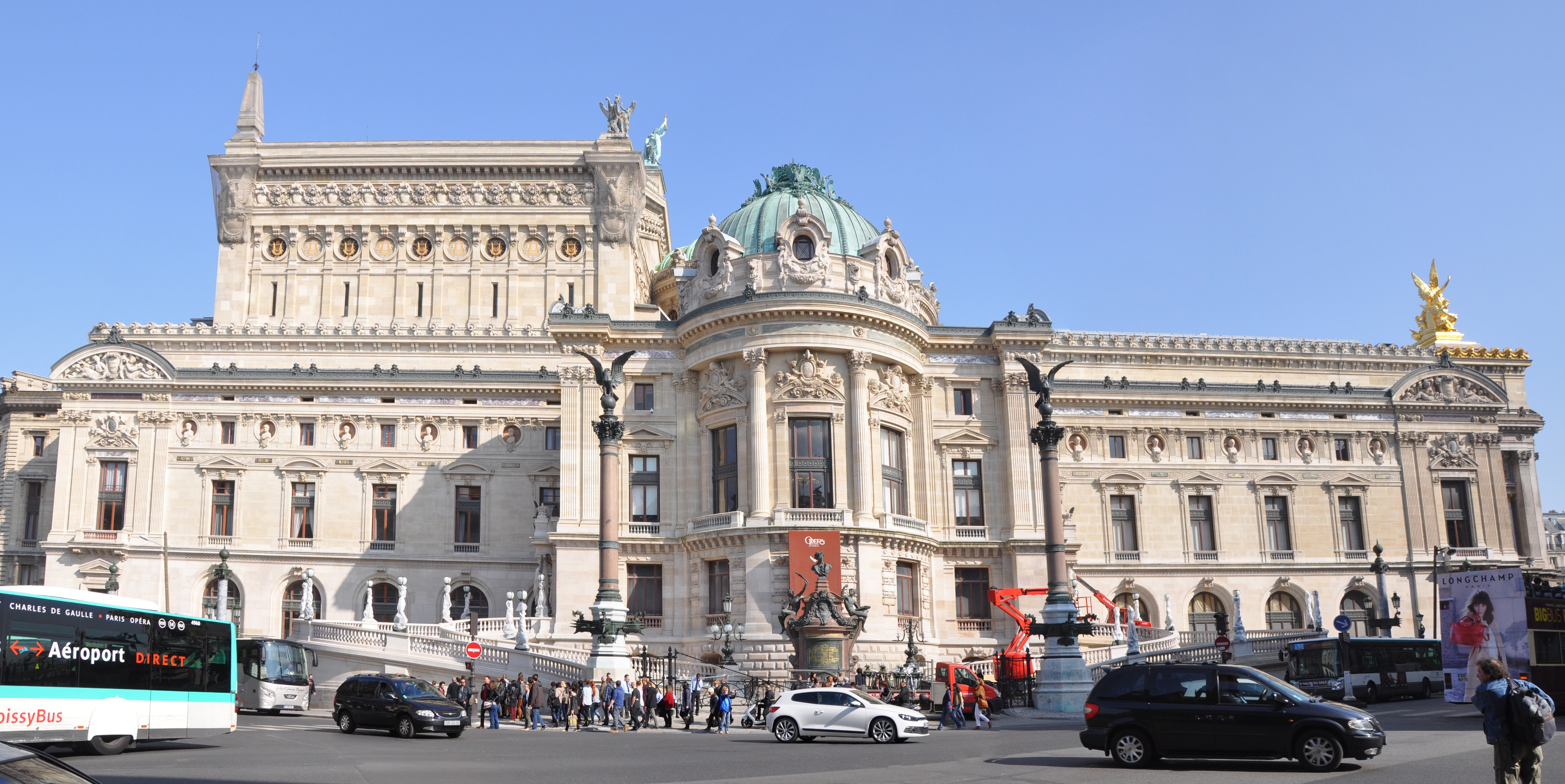 Panoramique rassemblant deux photos.